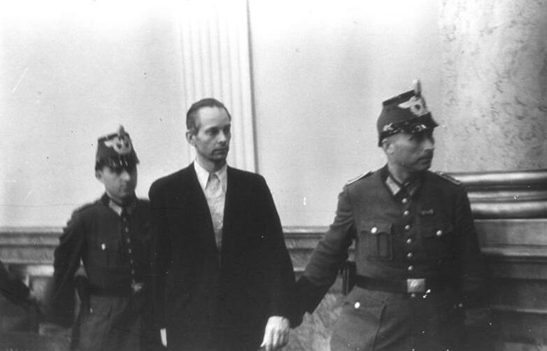 Volksgerichtshof, Peter Graf Yorck v. Wartenburg Graf Yorck v. Wartenburg, Peter Prozess 20. Juli 1944 [Berlin.- Volksgerichtshof, Prozess 20. Juli 1944; Peter Graf Yorck v. Wartenburg]